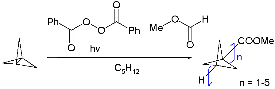 Staffanes